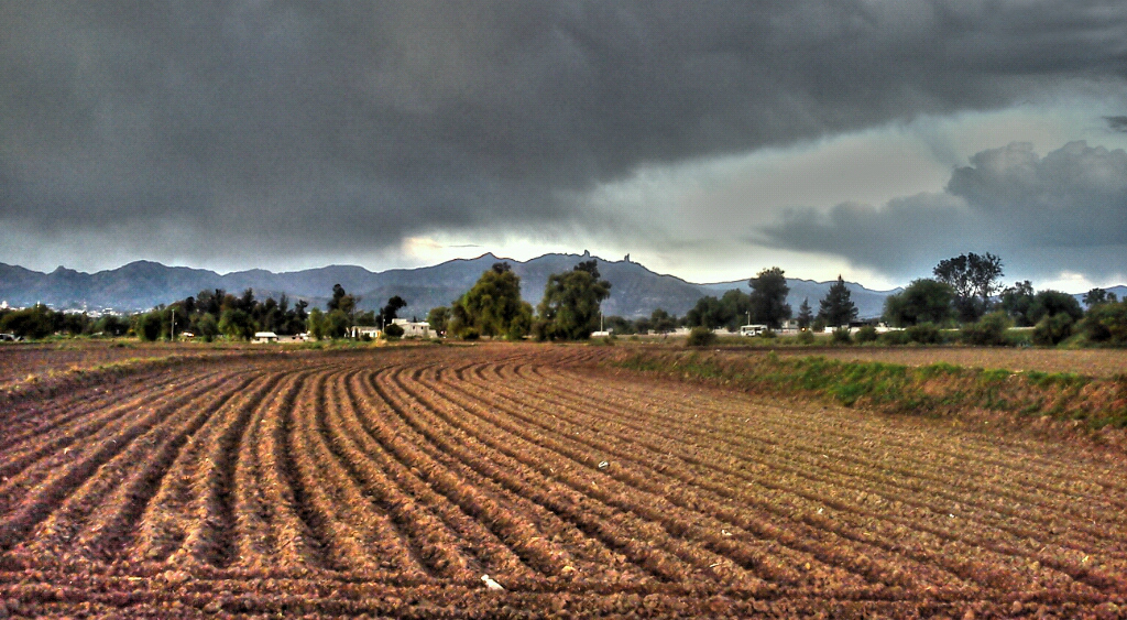 Valle del Mezquital visto desde los suburbios de Actopan, Hgo.